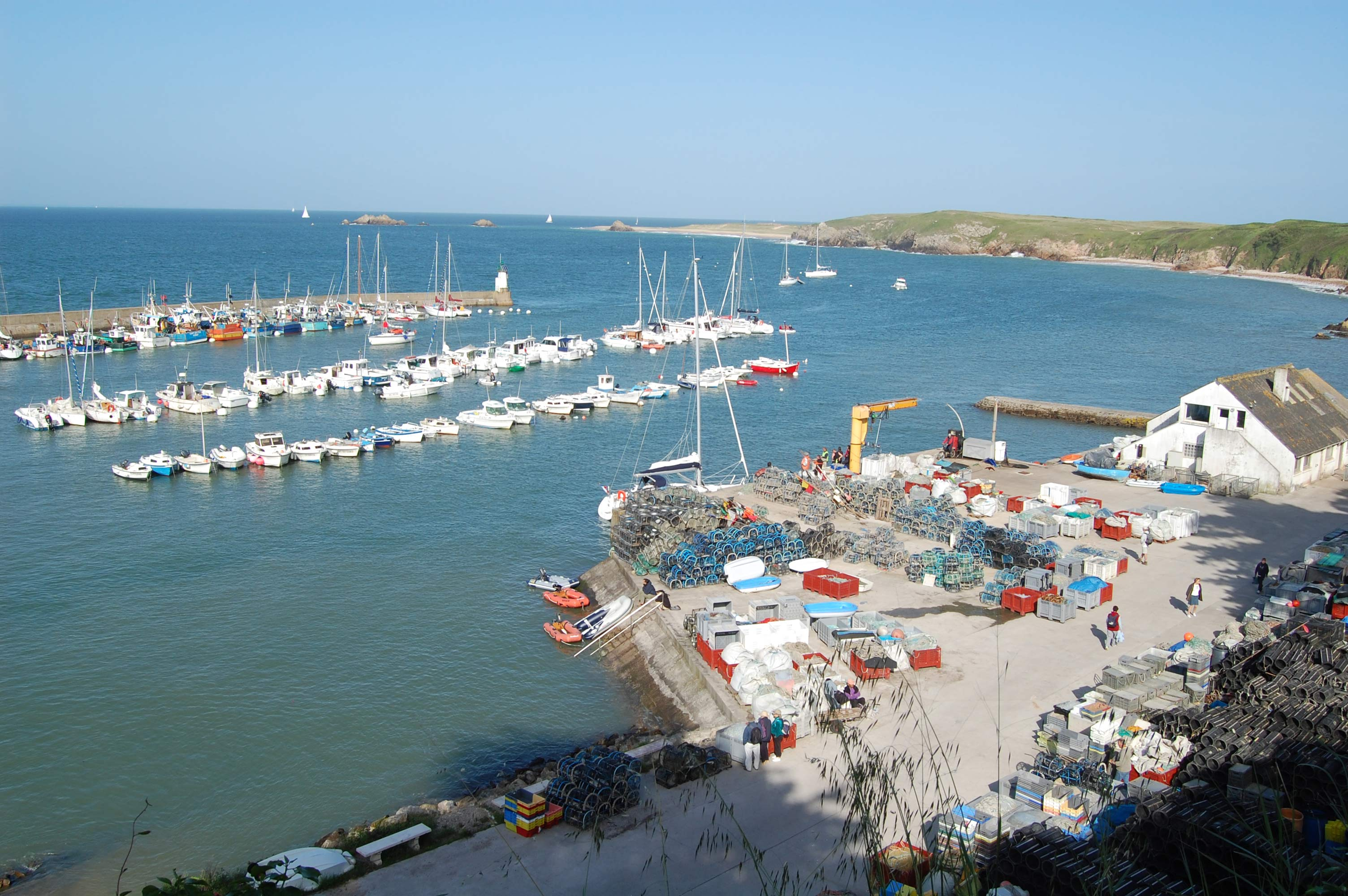 Description : Casiers dans le port de Houat Place : Ile de Houat, Bretagne, France Date : 2007 Auteur : Pline